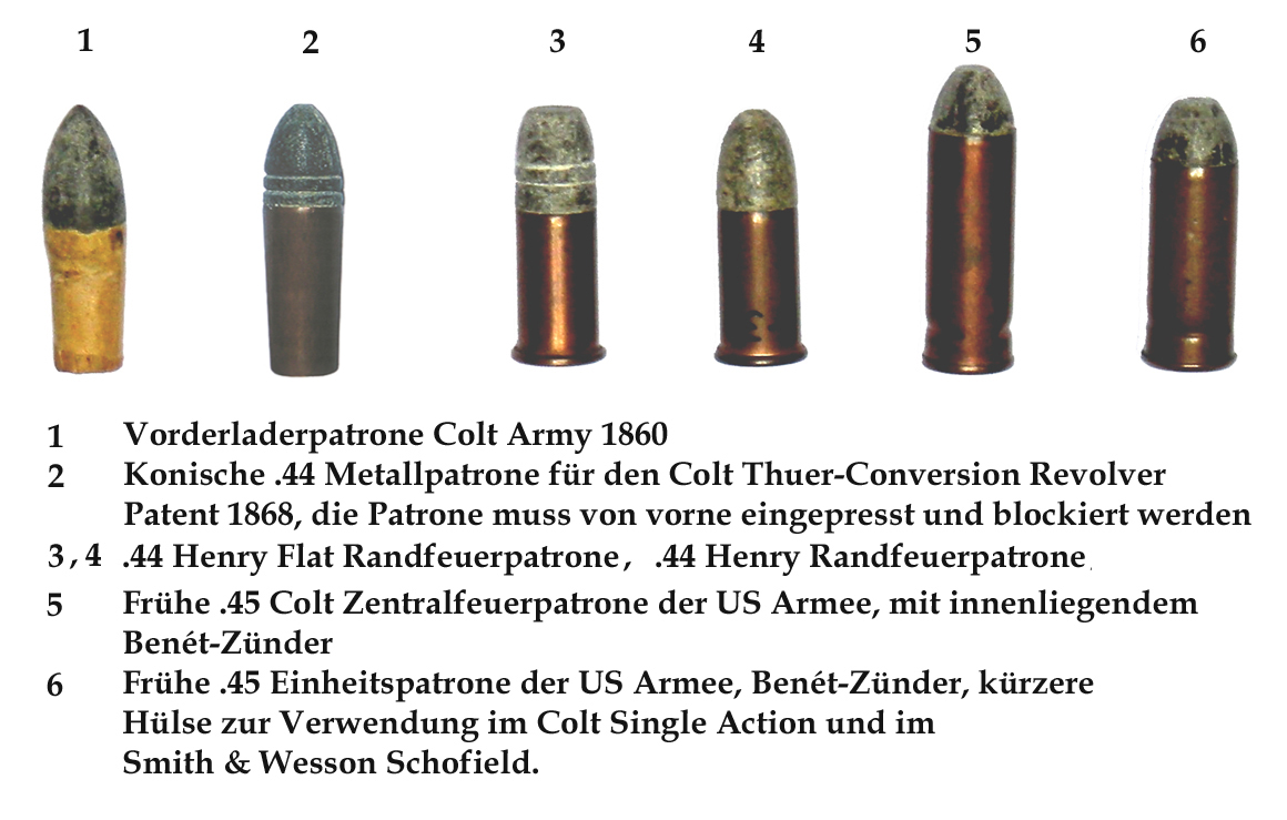 Entwicklung US Patronen 1860 bis 1875